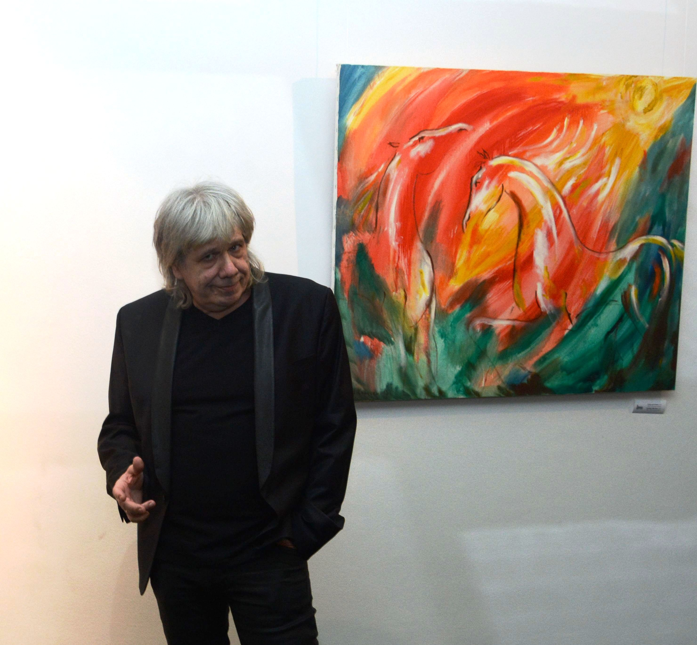 Miša Mihajlo Kravcev - Izložba "Purpurni feniks"